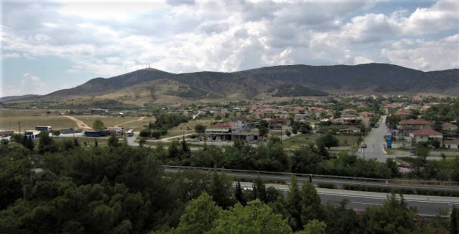 Όψη του Μακρυχωρίου από την ανατολική πλευρά